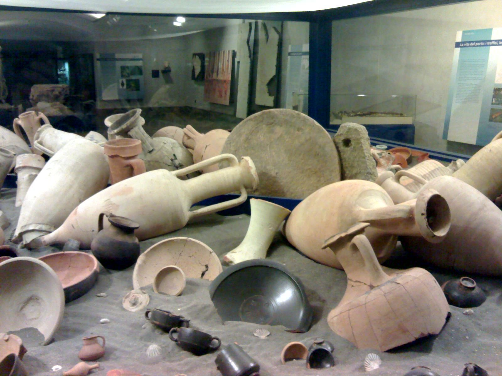 Alcuni reperti del Museo Stazione Neapolis di Napoli.